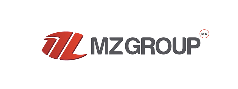 LOGO